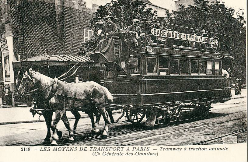 Carte postale ancienne éditée par ES, N° 2148 : tramway hippomobile de la Compagnie générale des omnibus, ligne TAH, Vaugirard – Gare du Nord.